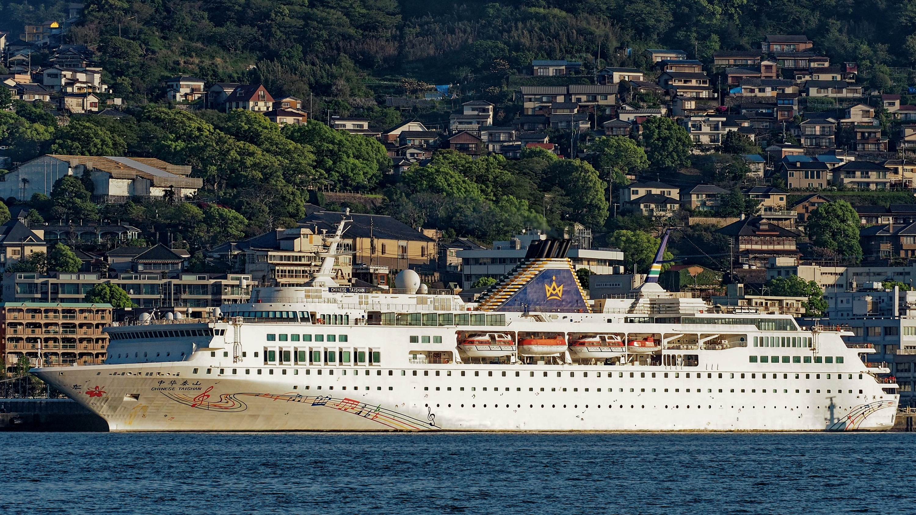 クルーズ客船「中華泰山（チャイニーズ・タイシャン・IMO 9183506）」（長崎県長崎市）